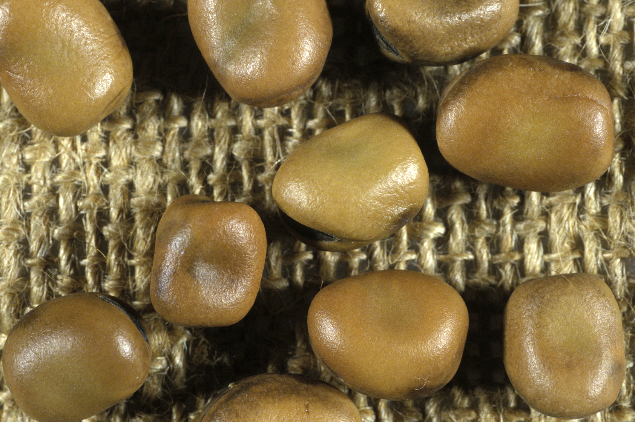 INRA, Jean Weber